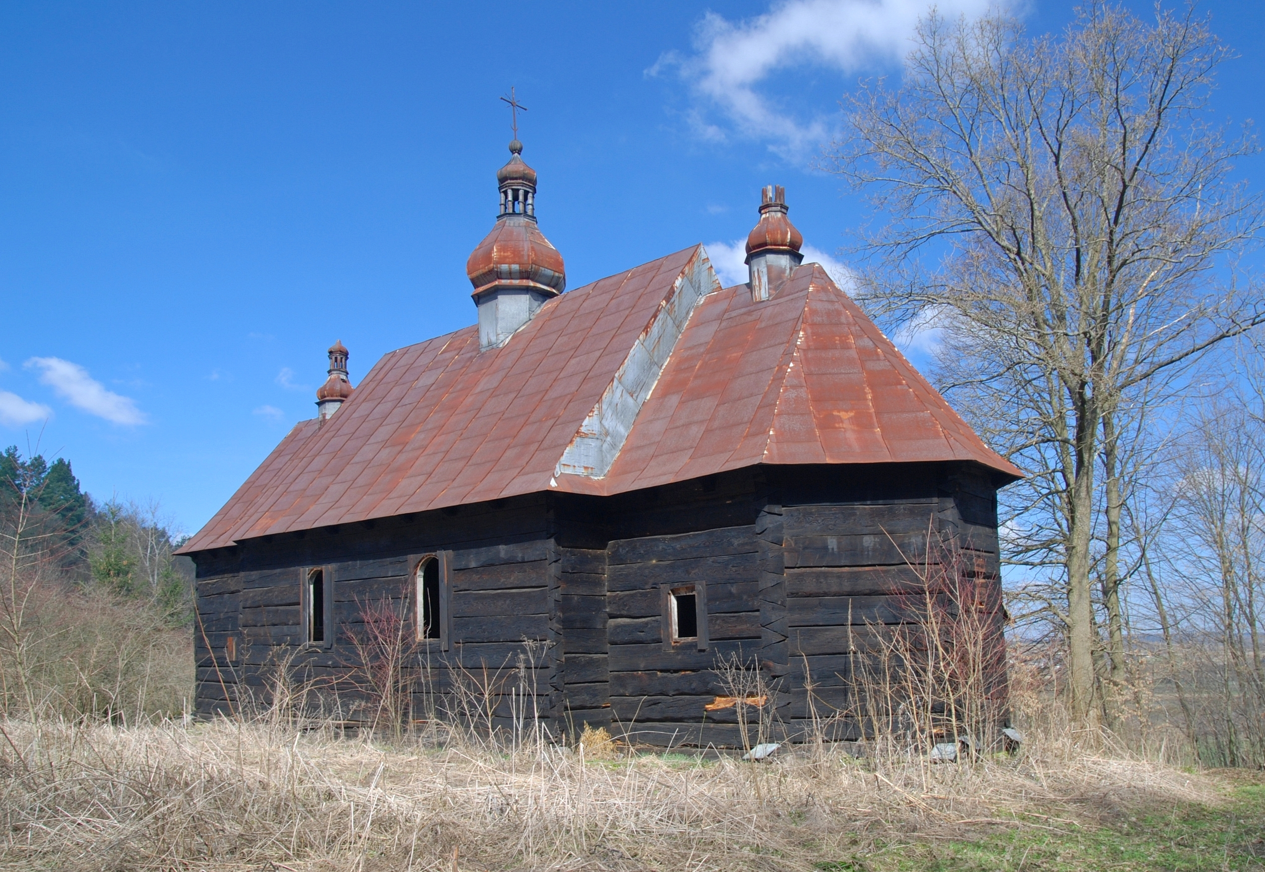 wieś Chyrzynka